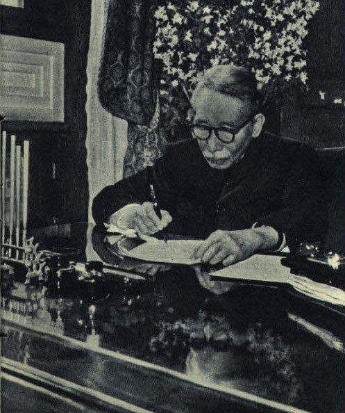 1962-02 1962年 农业学家丁颖